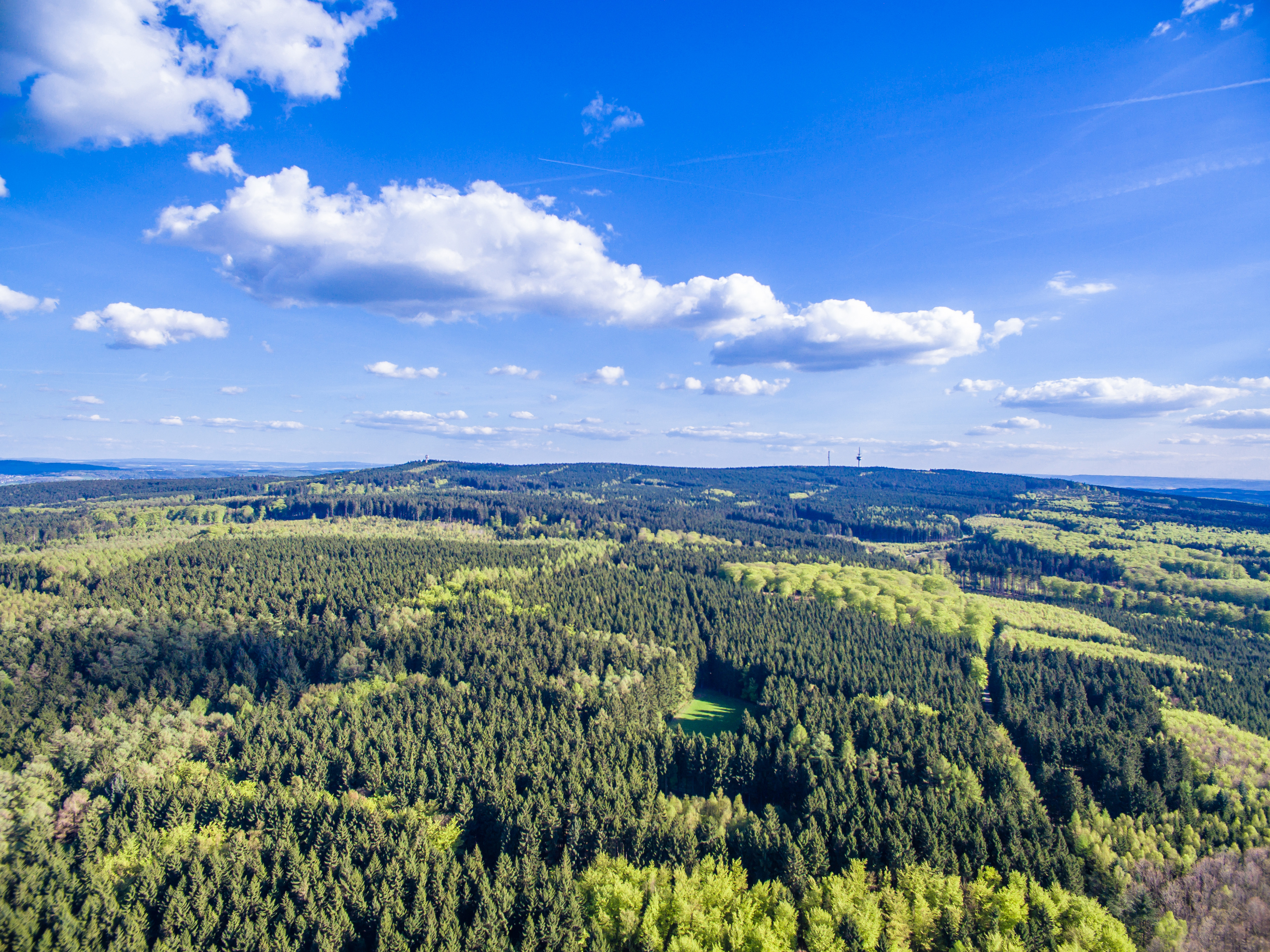 Luftbildaufnahme der Montabaurer Höhe. Standort von Ransbach-Baumbach aus.